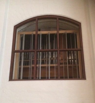 Fernwerk St. Thaddäus - Augsburg